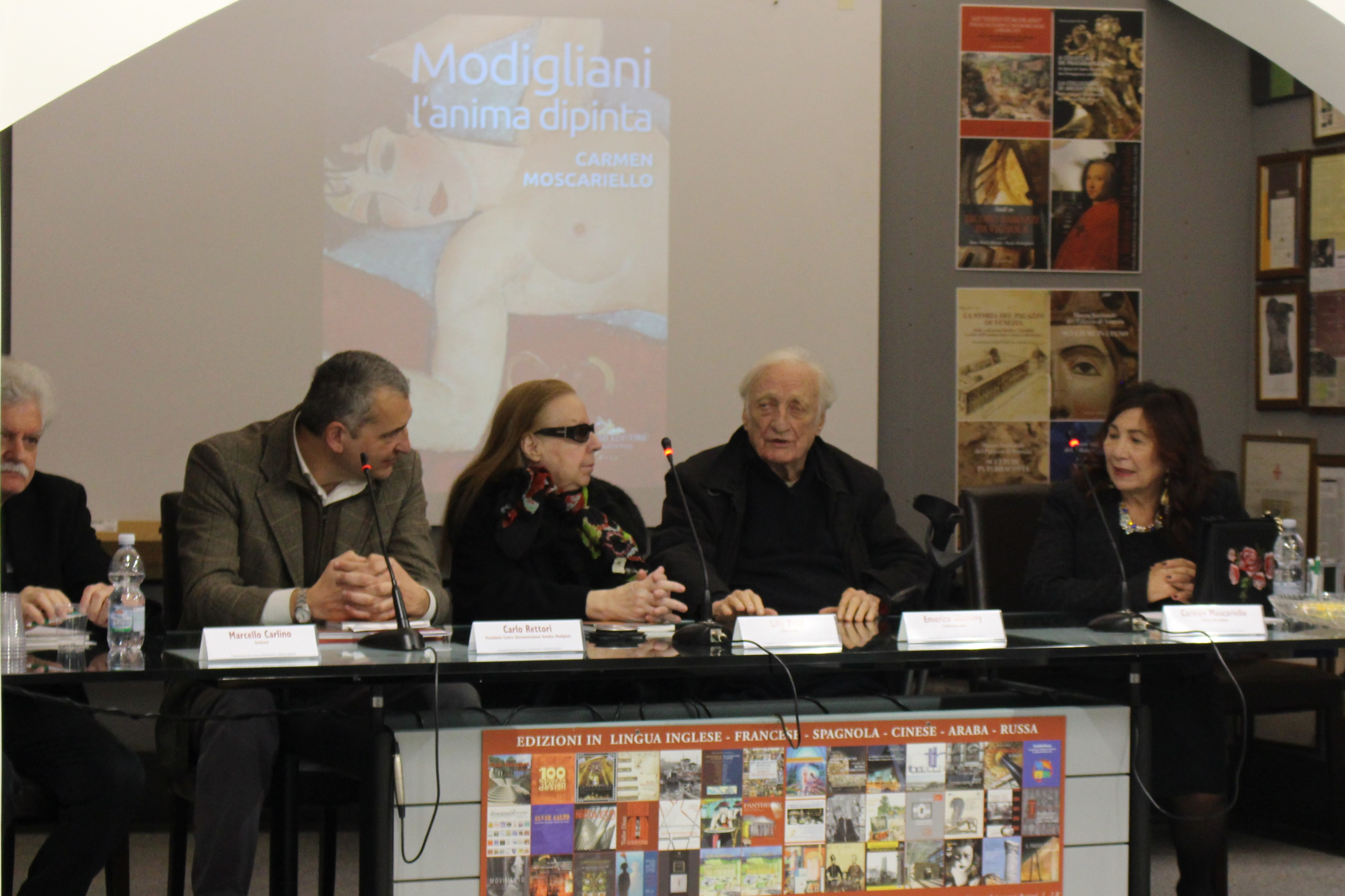 Carmen Moscariello con Emerico Giachery, Lilly Brogi, Marcello Carlino, Carlo Rettori